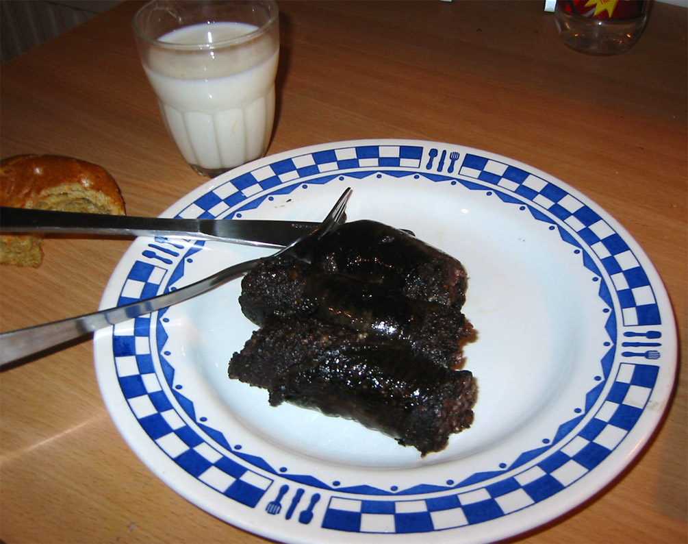 Mustamakkara (black sausage), without lingonberry jam.